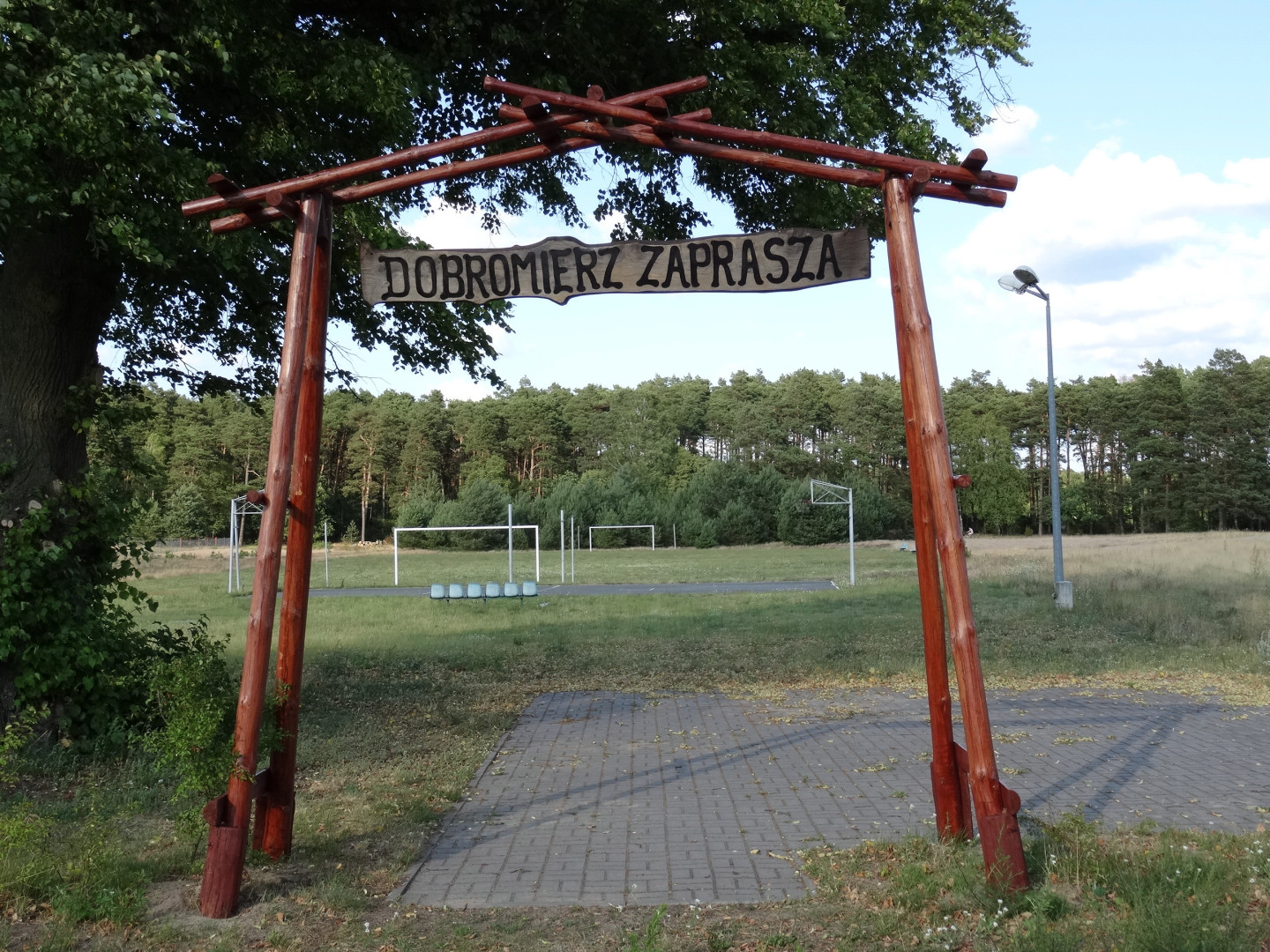 Dobromierz, gmina Nowa Wieś Wielka, powiat bydgoski